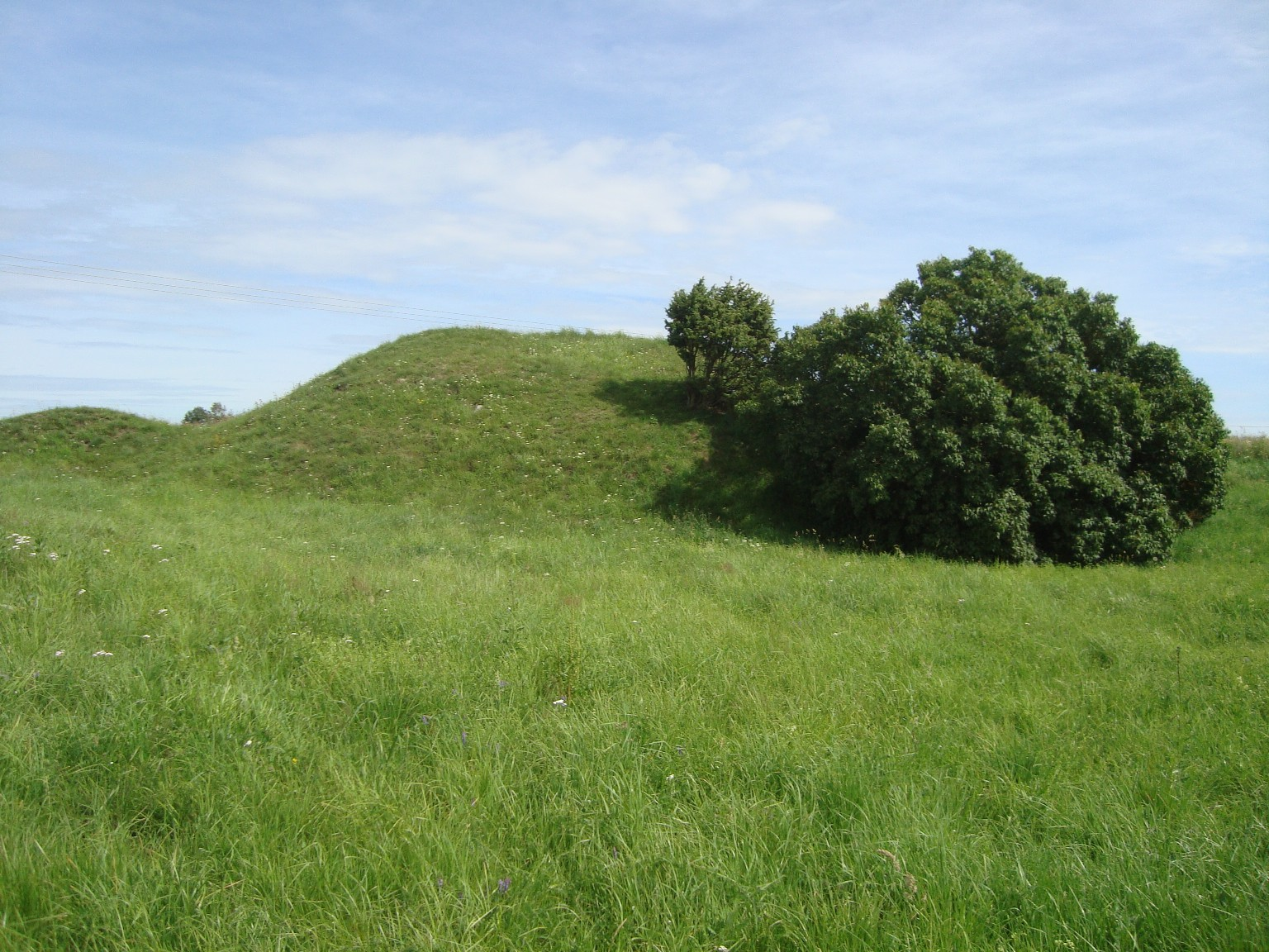 Torshögen. Gravhög mellan Kumla och Fjugesta i Närke.